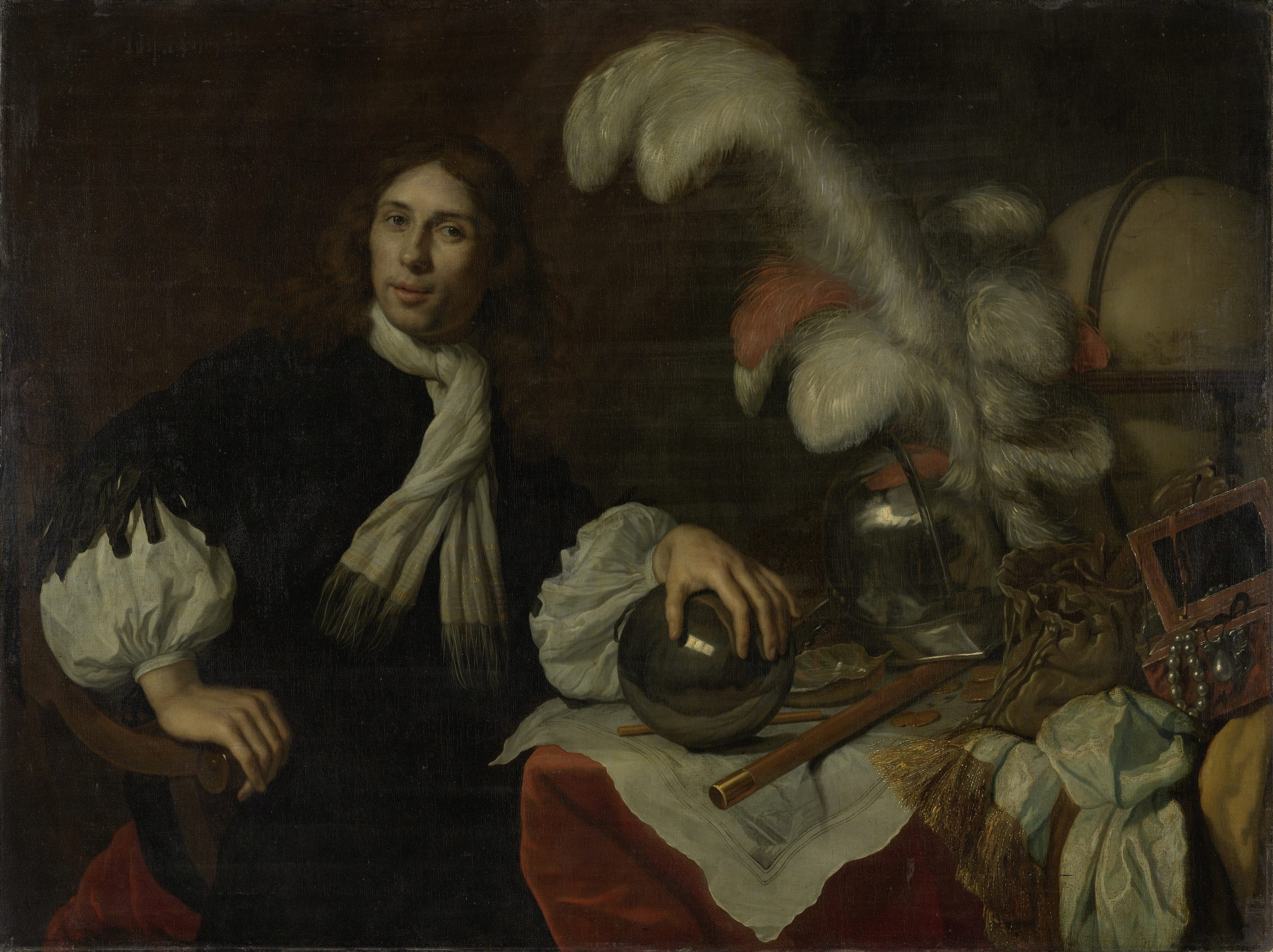 Postuum portret van Aucke Stellingwerff, admiraal van de admiraliteit van Friesland, gesneuveld in 1665 bij Lowestoft door een kanonskogel. Portret ten halven lijve, zittend in een stoel, met de linkerhand op de kanonskogel die voor hem op een tafel ligt. Verder op tafel: een helm met pluimen, commandostaf, geldstukken, een prent of kaart, een buideltje, een kistje met sieraden en een globe.